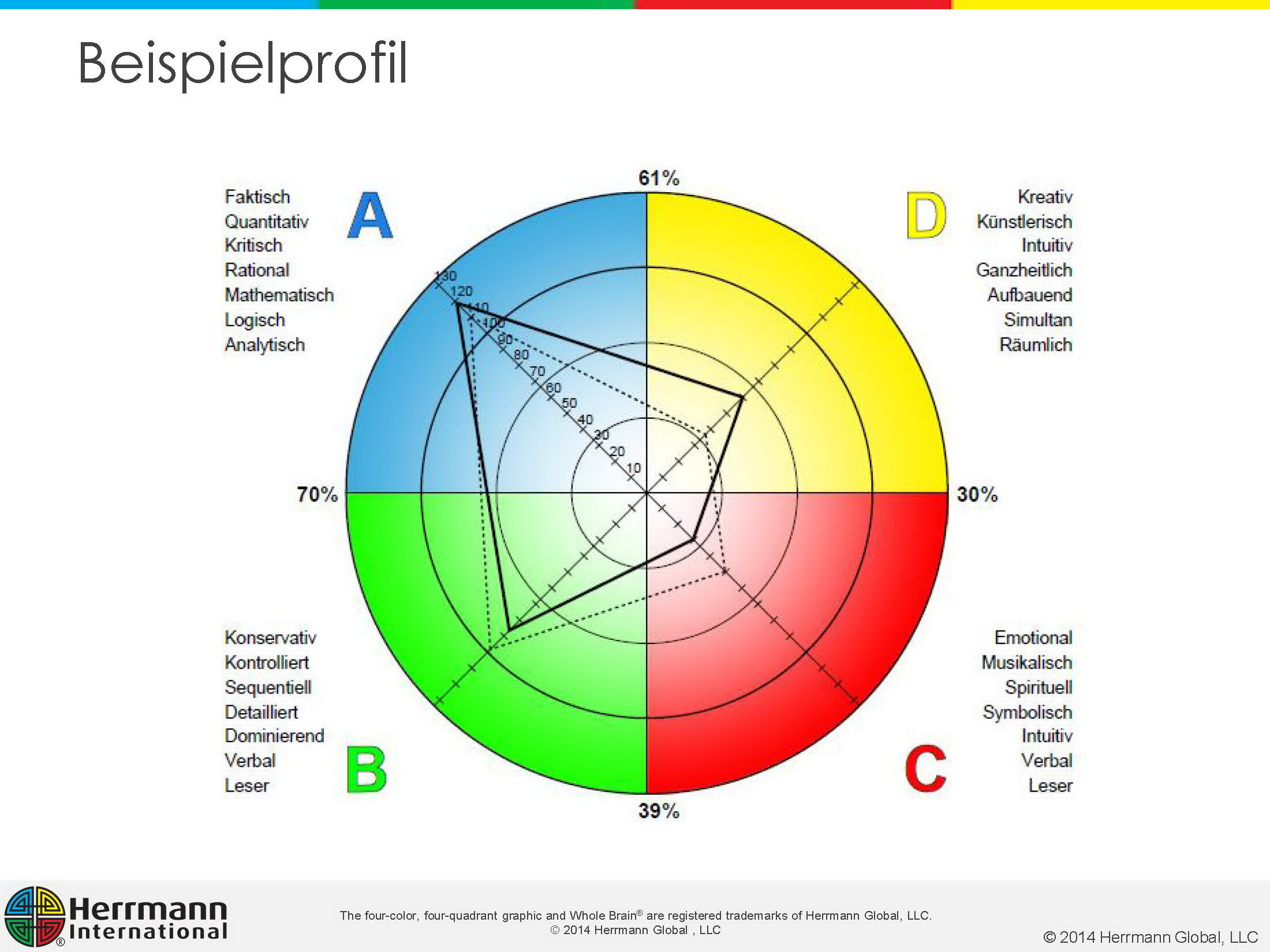 Beispielprofil des HBDI